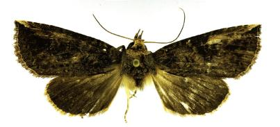 Elasmia mandela (2d) adults.